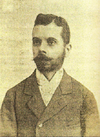 Retrato del arquitecto Martín Pastells y Papell (Figueras, 1856 - Madrid, 1926).